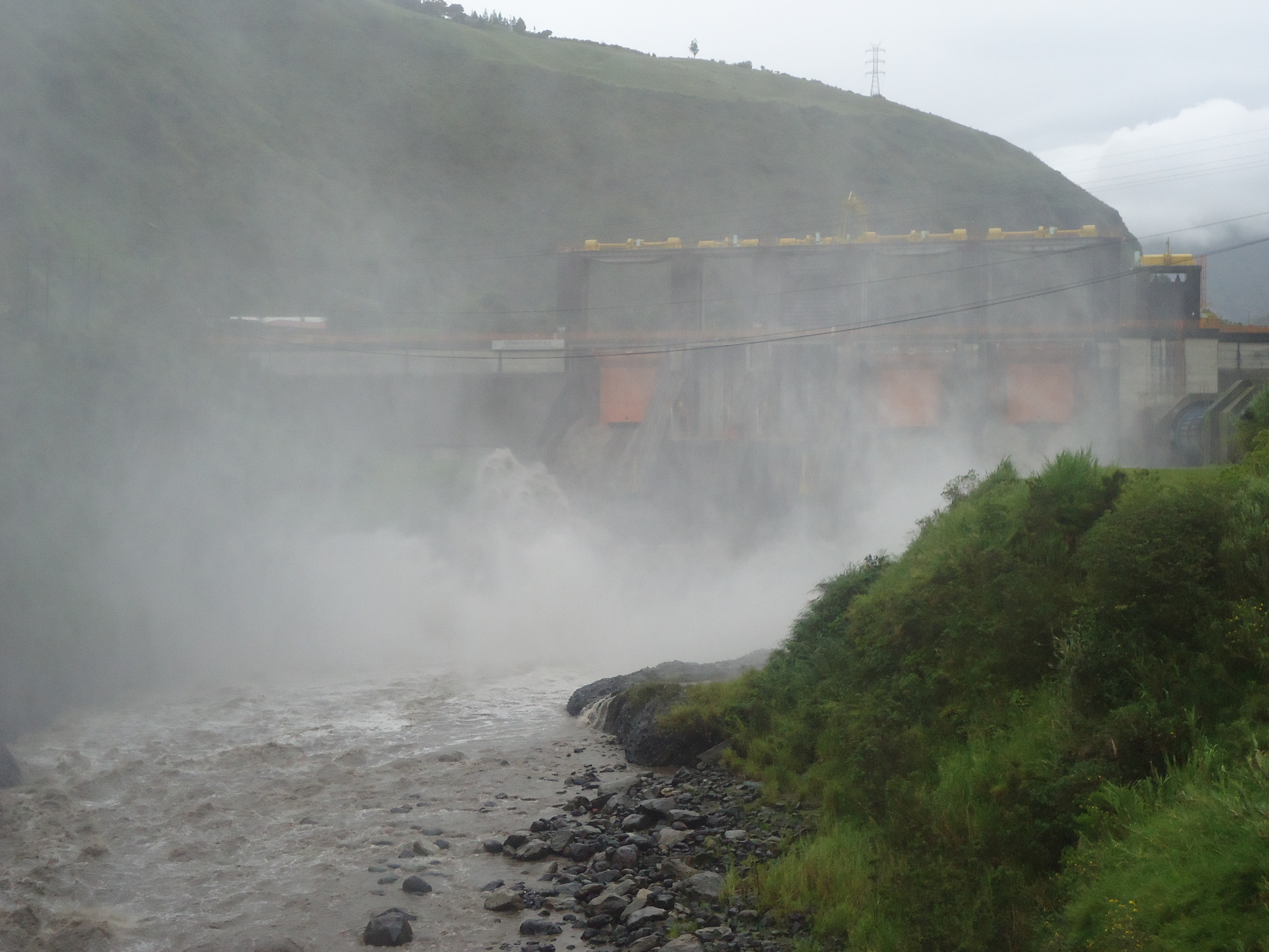 Represa Hidroeléctrica de Agoyán (Baños de Agua Santa)